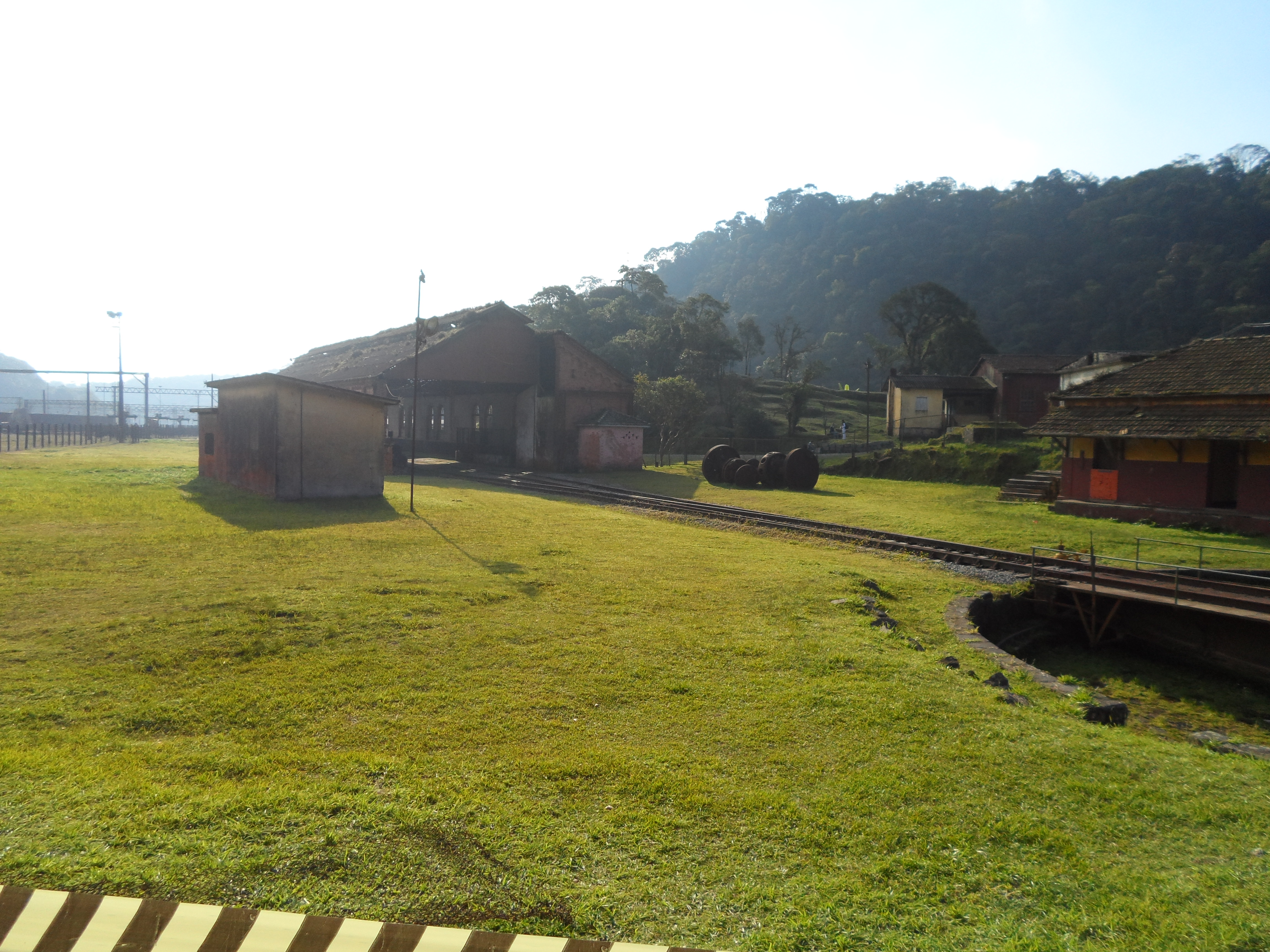 Campo de grama na Estação Ferroviária do vale de Paranapiacaba